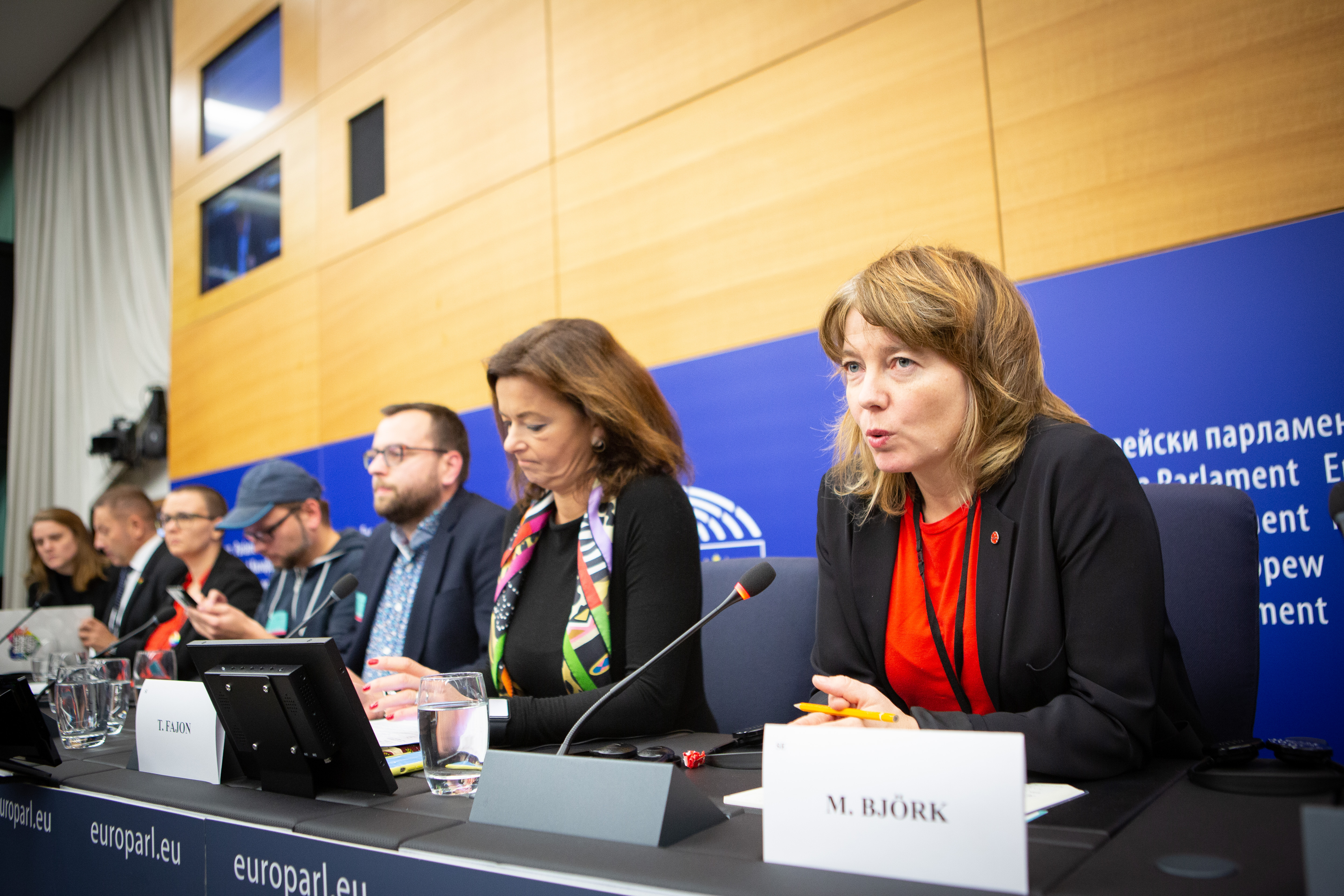 F70A5564-2